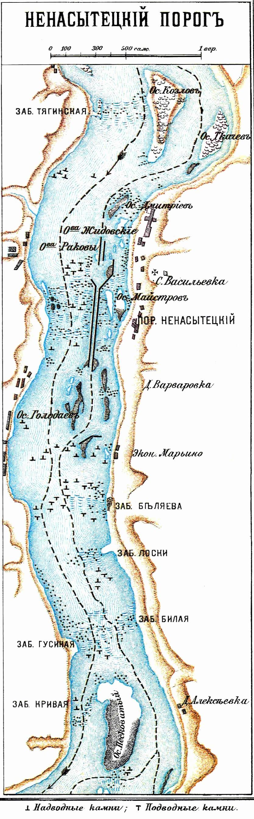 Ненаситецький порог